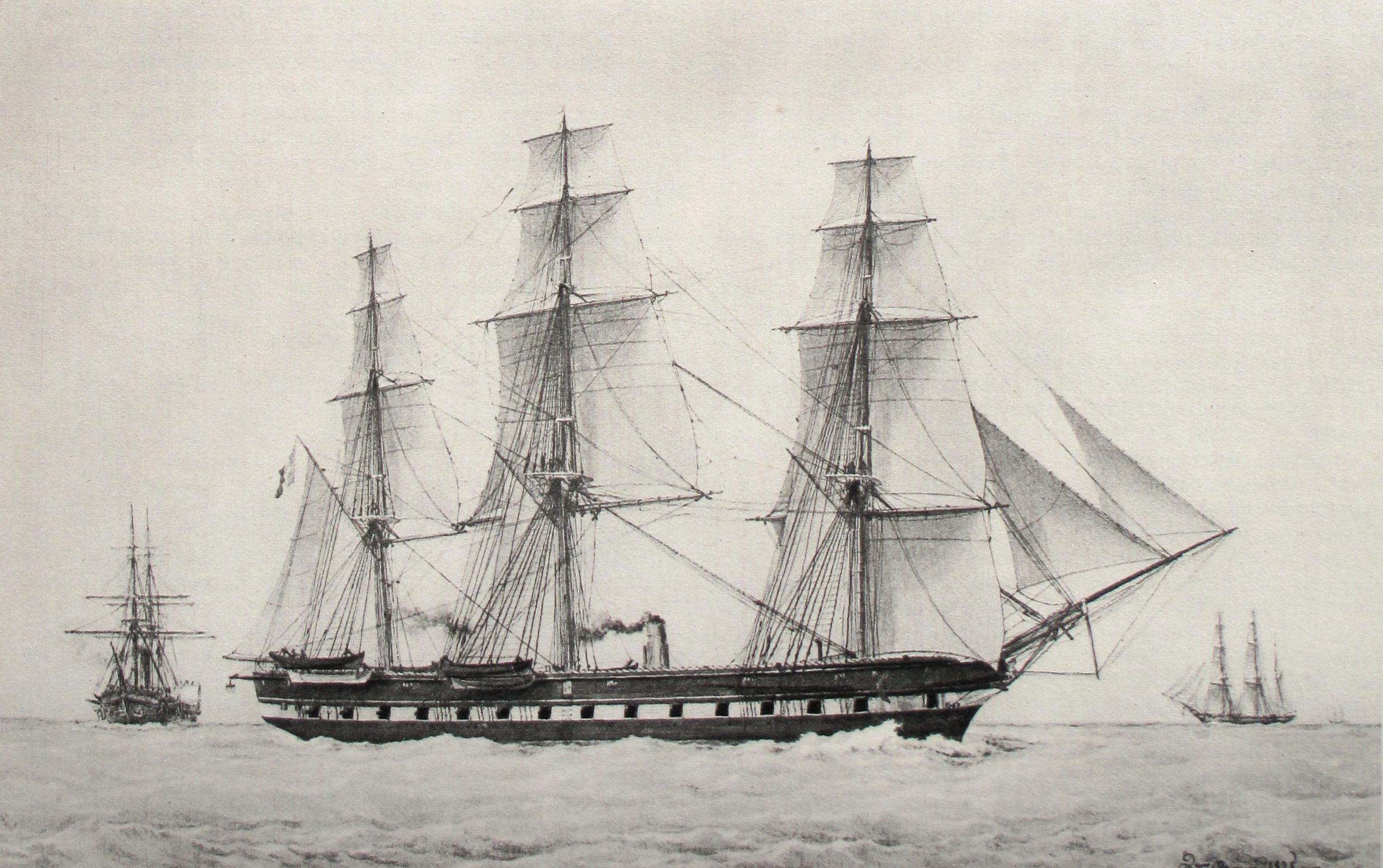 Frigate Pomone (1845). Frégate Pomone (1845).